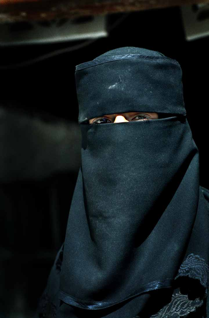 Muslim woman in Yemen.Yemen n002